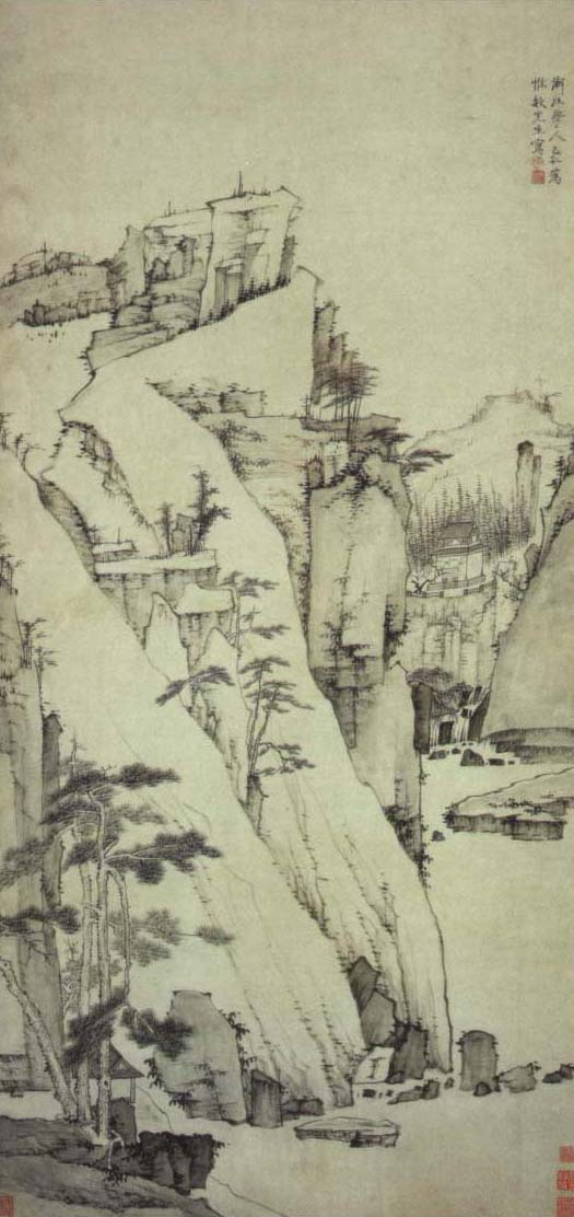 弘仁（1610一1663）名作松壑清泉圖，廣東省博物館，纸本水墨，纵134厘米，横59.5厘米